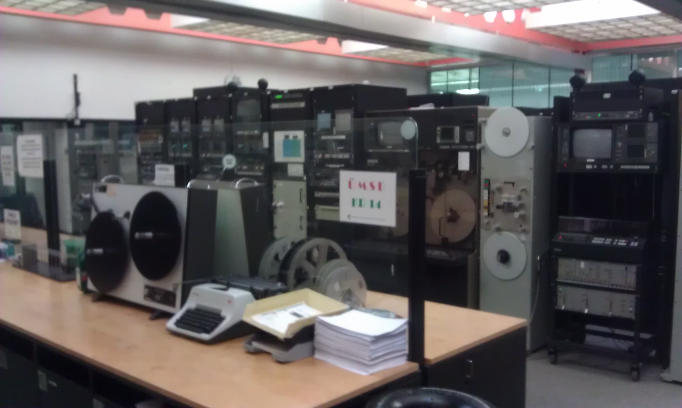 Zentraler Maschinenraum im ORF, Bandgeräte